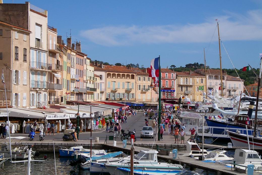 Stadtansicht von Saint Tropez